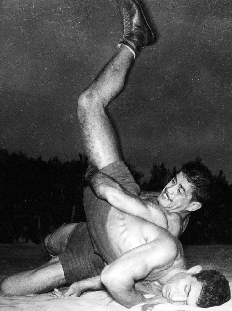 Mehdi Yaghoubi